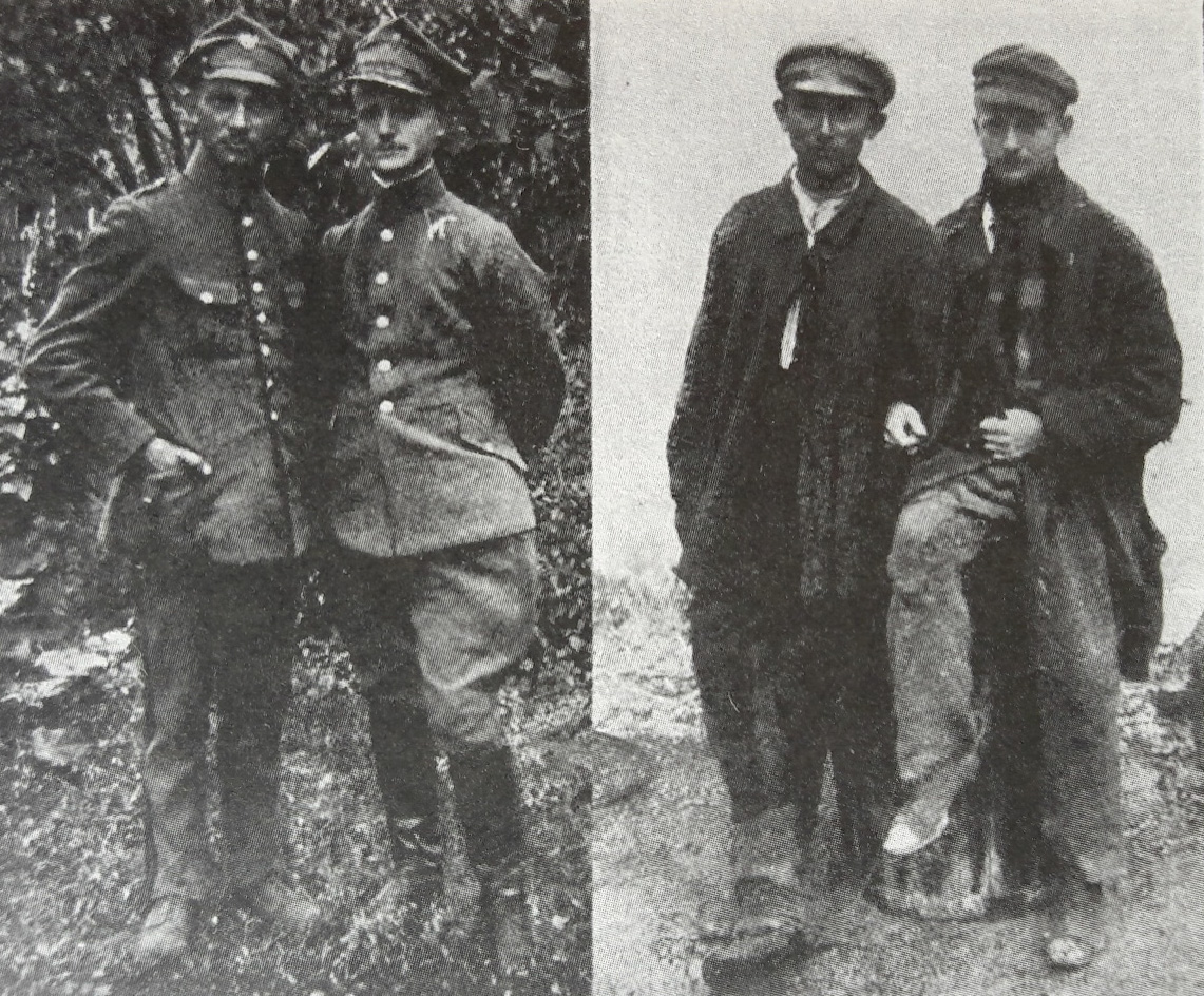 Leonard Hudzicki sierż. obs. i Alojzy Błażyński sierż. pilot - przed i po sowieckiej niewoli